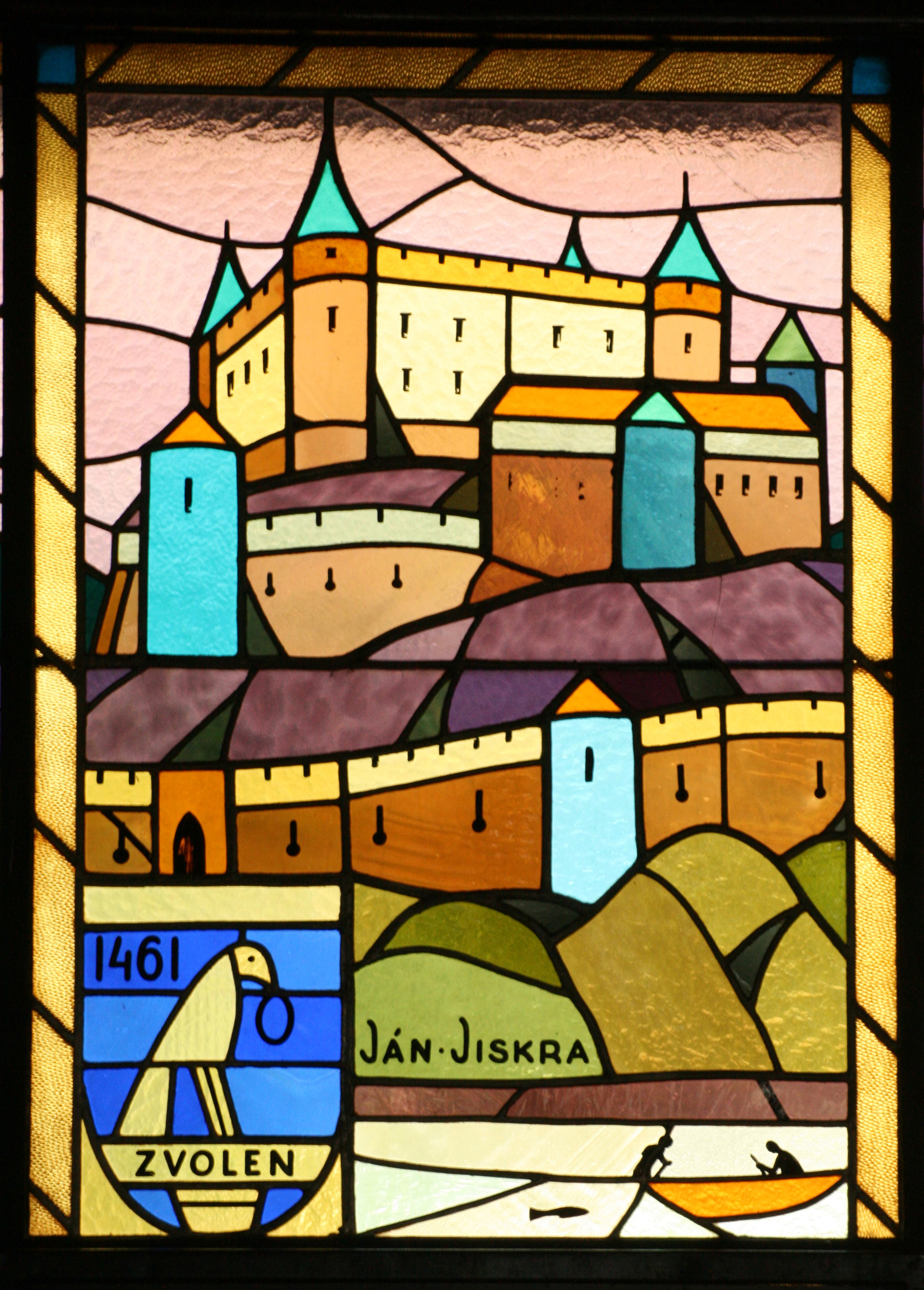 Autorom vitráže v interiéri PKO v Bratislave v roku 1957 bol národný umelec Janko Alexy